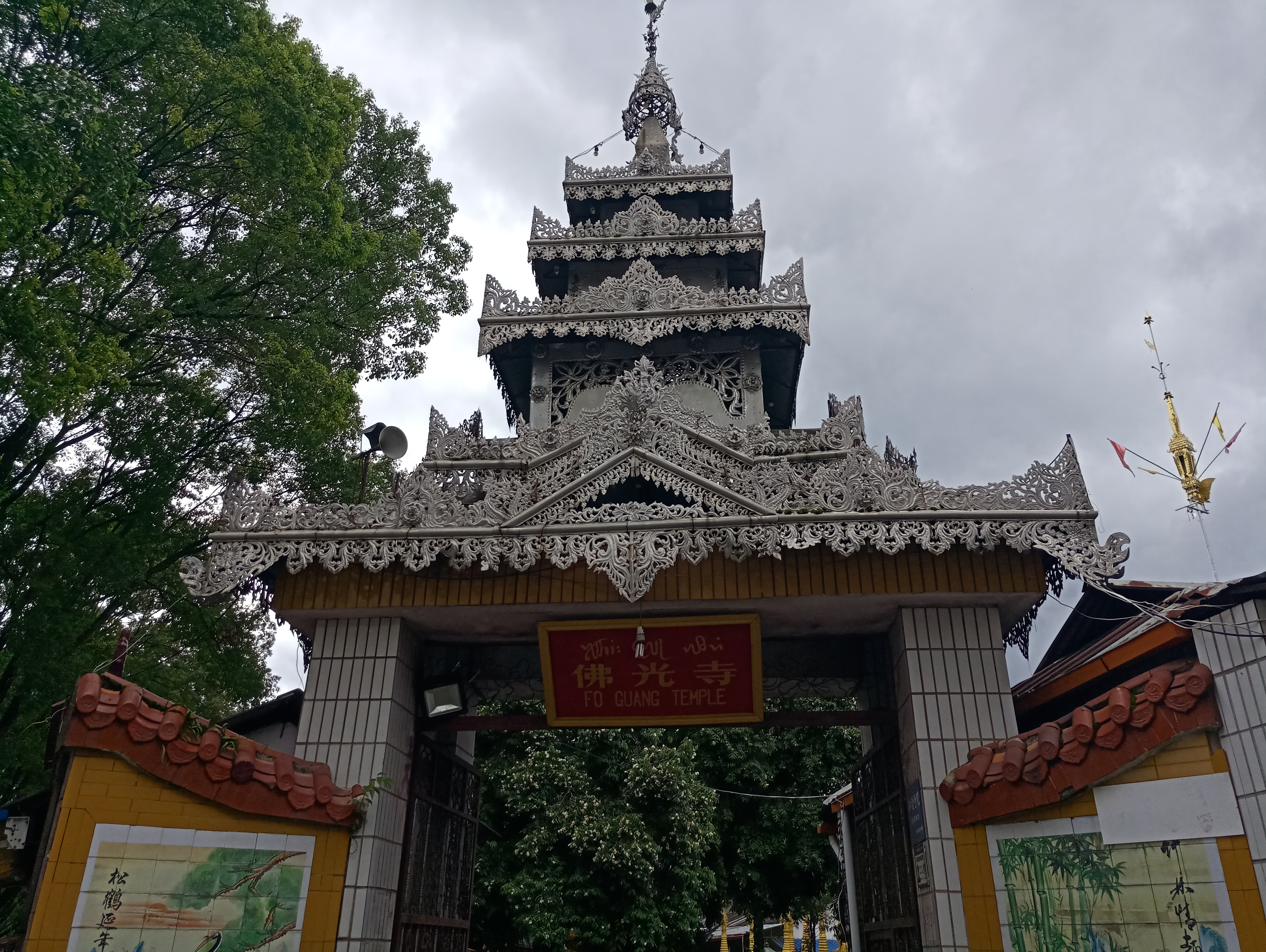 芒市佛光寺-大门